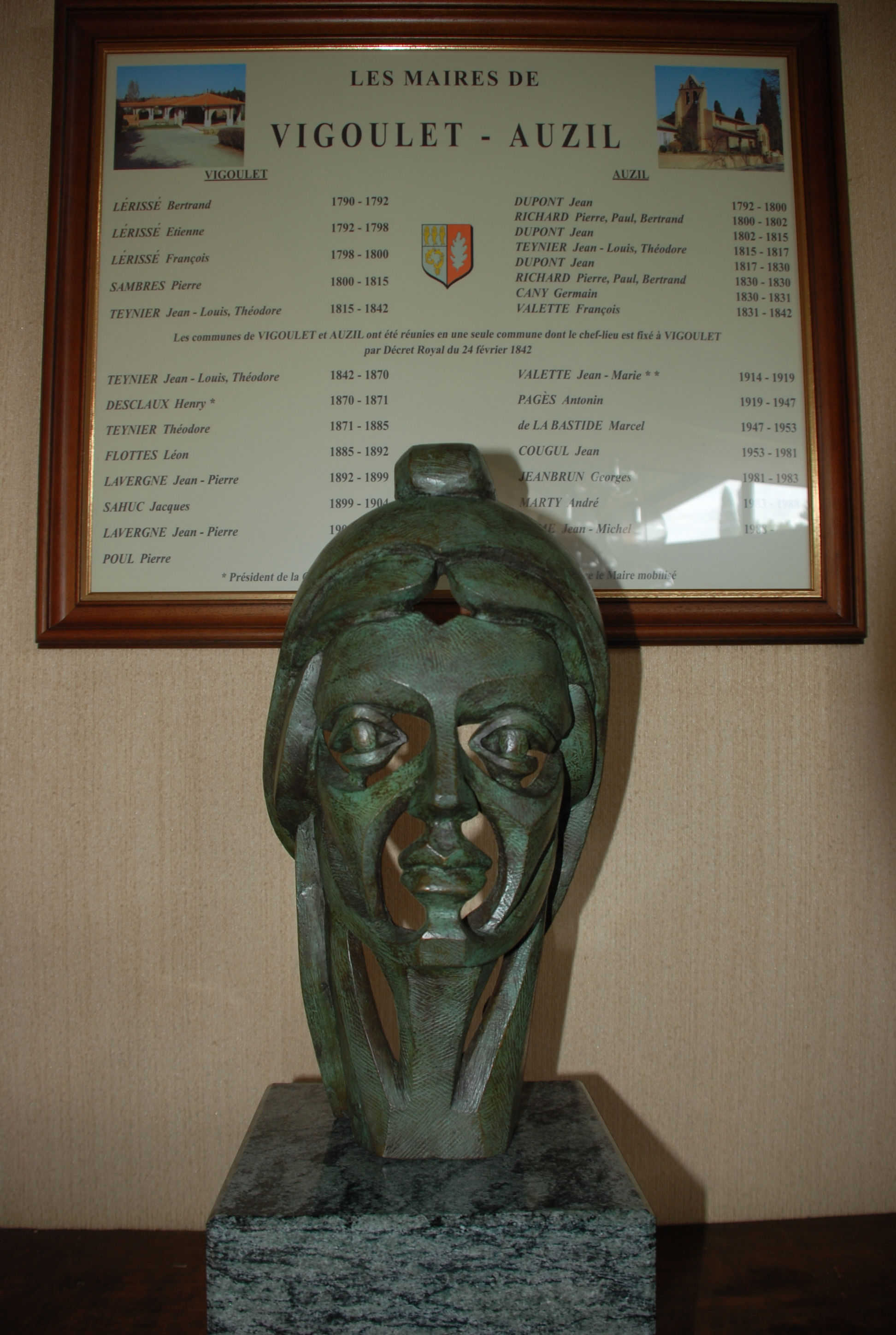 Tableau des maires d'Auzil, de Vigoulet et de Vigoulet-Auzil dans la salle du conseil municipal de vigoulet-Auzil. Au premier plan, la Marianne de Georges Fréchin